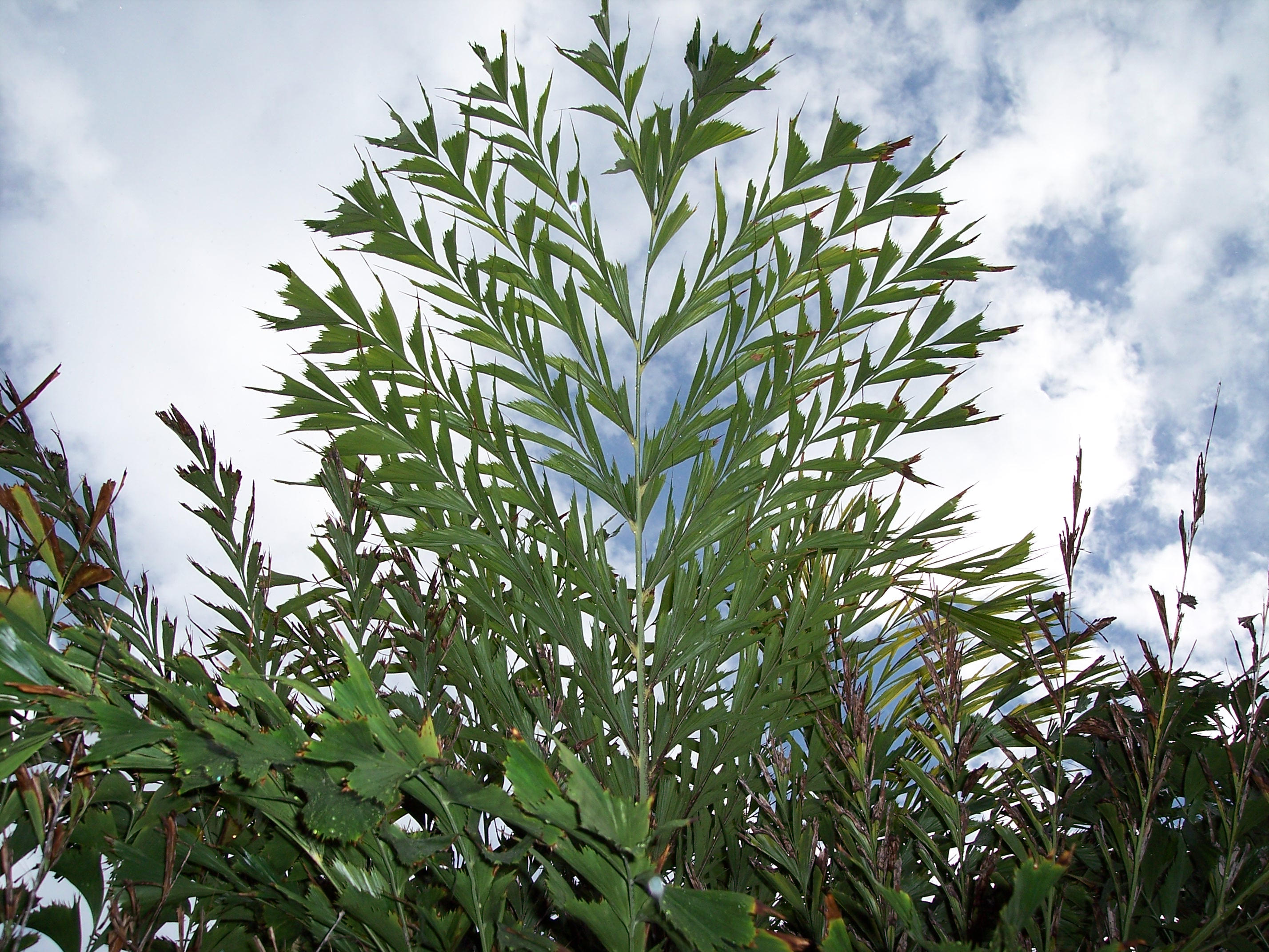 Doppelt gefiedertes Blatt.